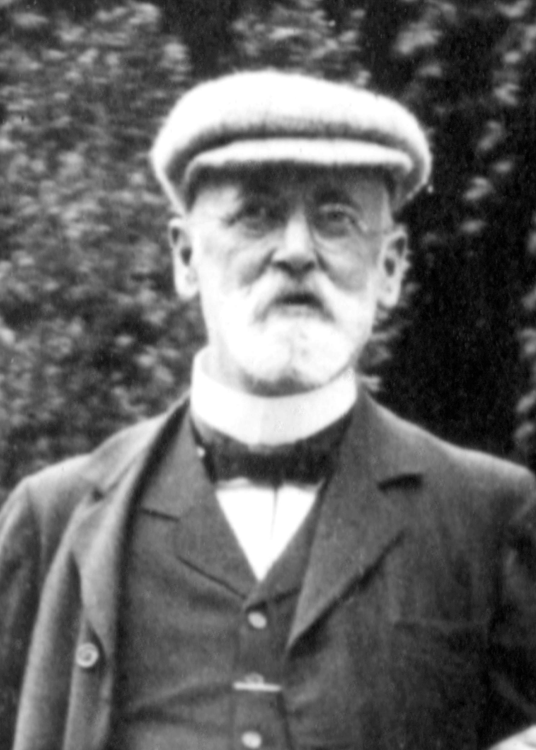 Gustav Vischer (1846 - 1920), Industrieller, Direktor der Daimler-Motorenwerke, Cannstatt